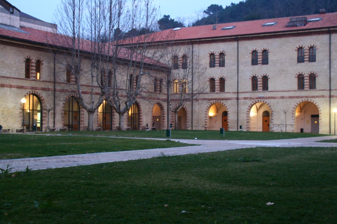 L'interno della caserma Villarey, ad Ancona, sede della facoltà di economia dell'Università politecnica delle Marche.